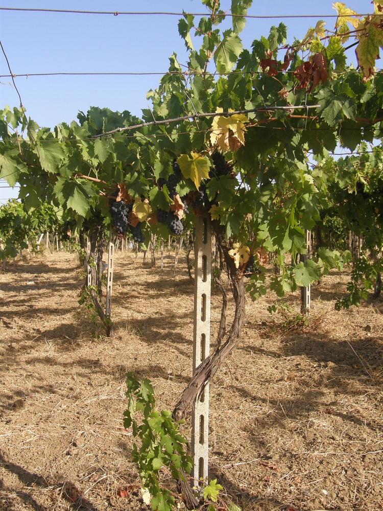 Montepulciano d'Abruzzo Centrale" in Pescara